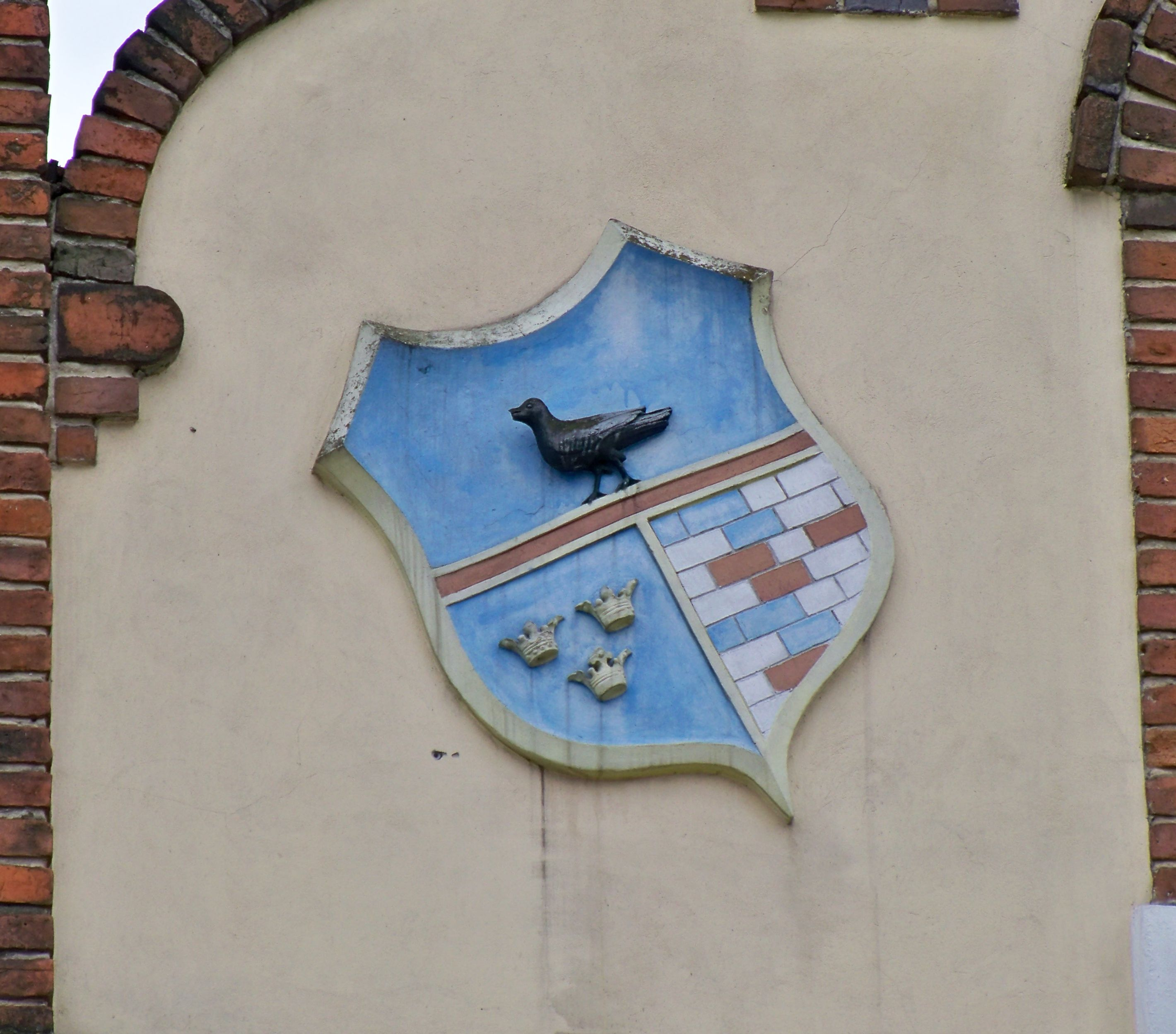 Herb Galicji-Lodomerii na Magistracie w Sokołowie Młp.